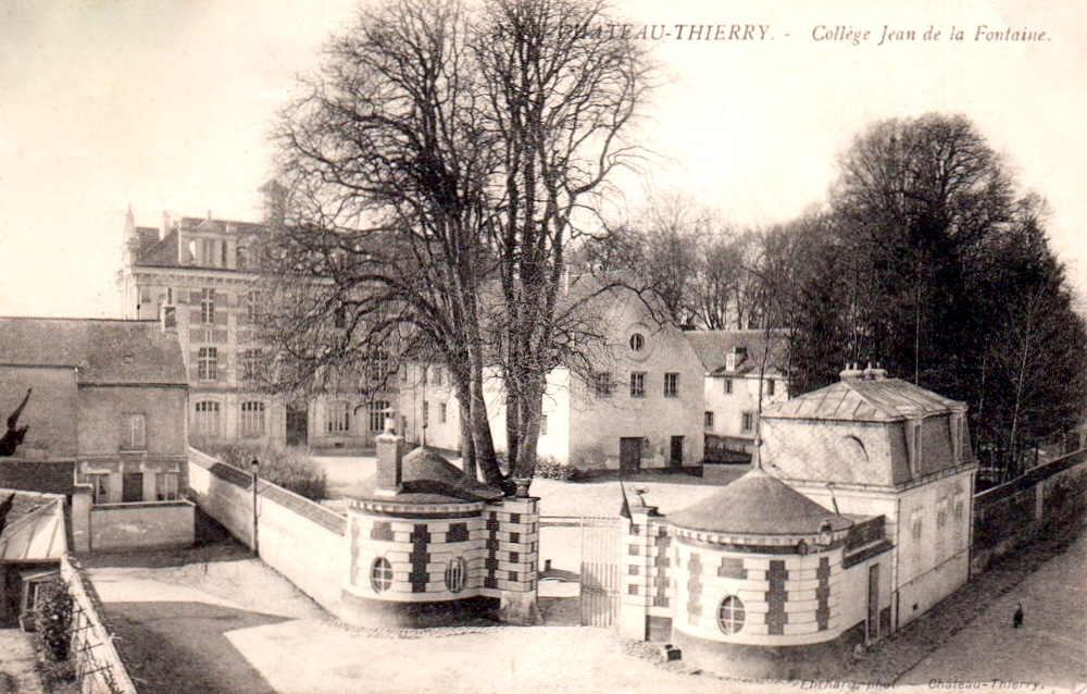 Château-Thierry, collège Jean de La Fontaine. Vers 1910.